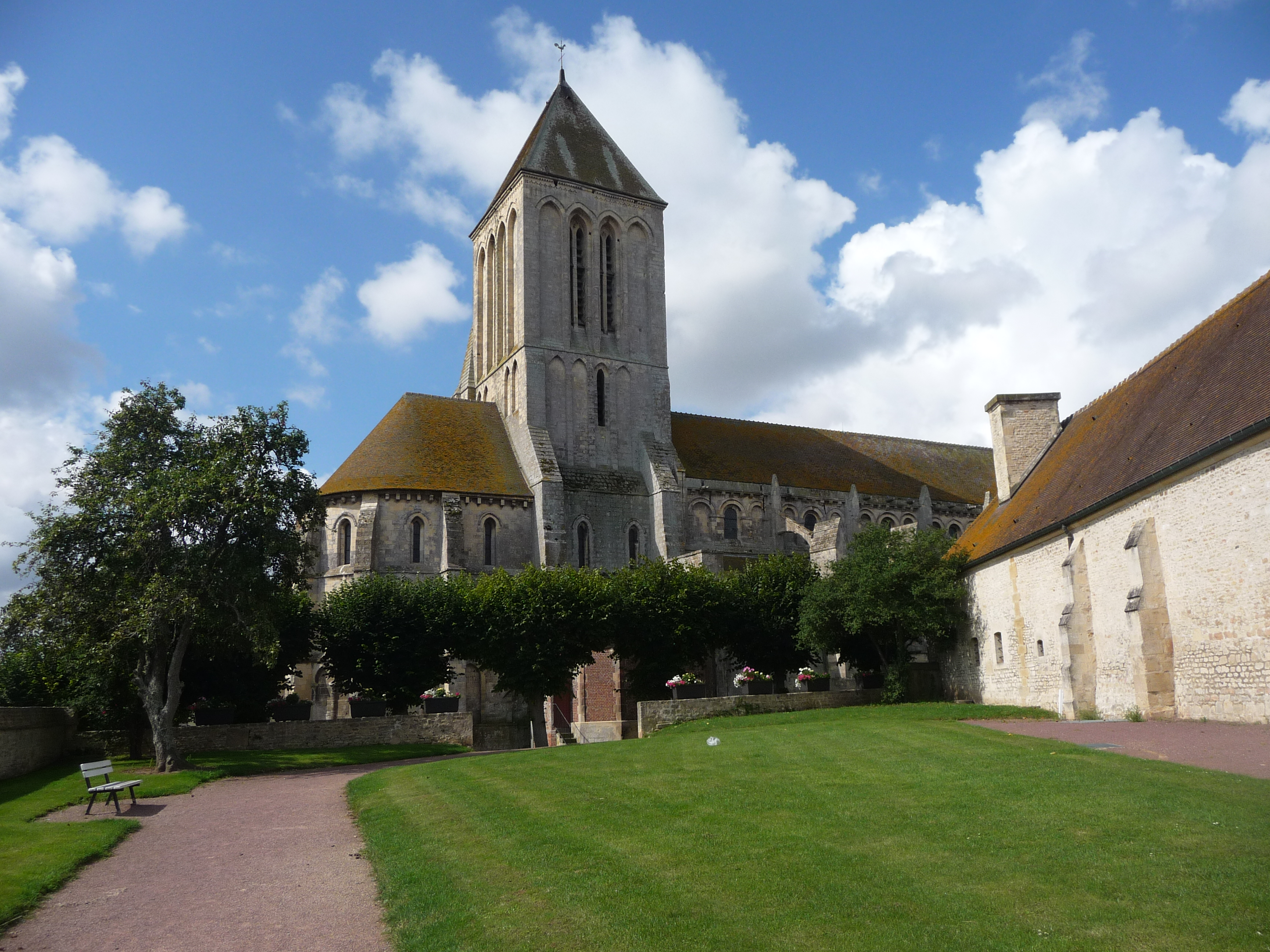 église du 12ème siècle extérieur